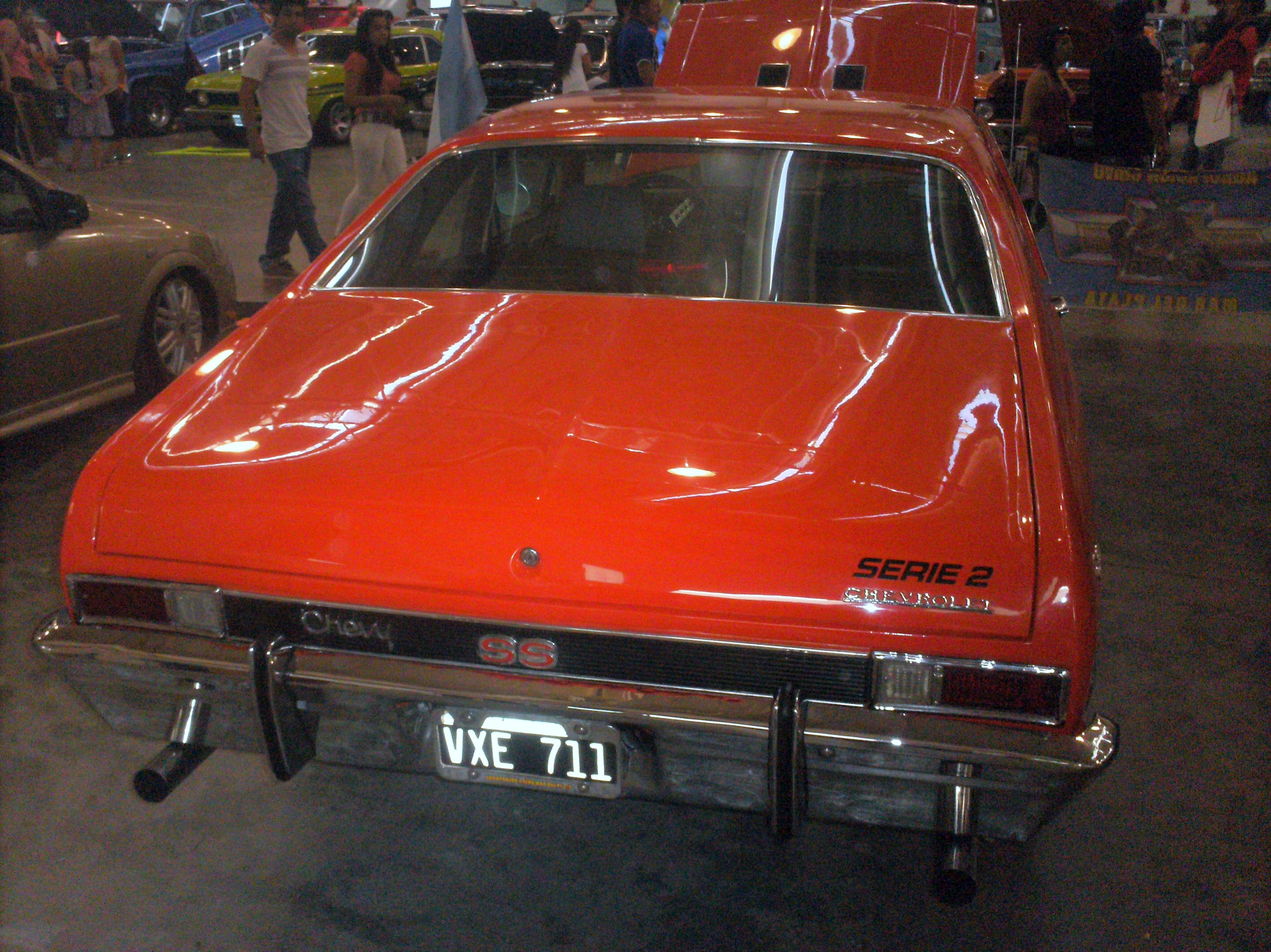 Chevy Super parte trasera